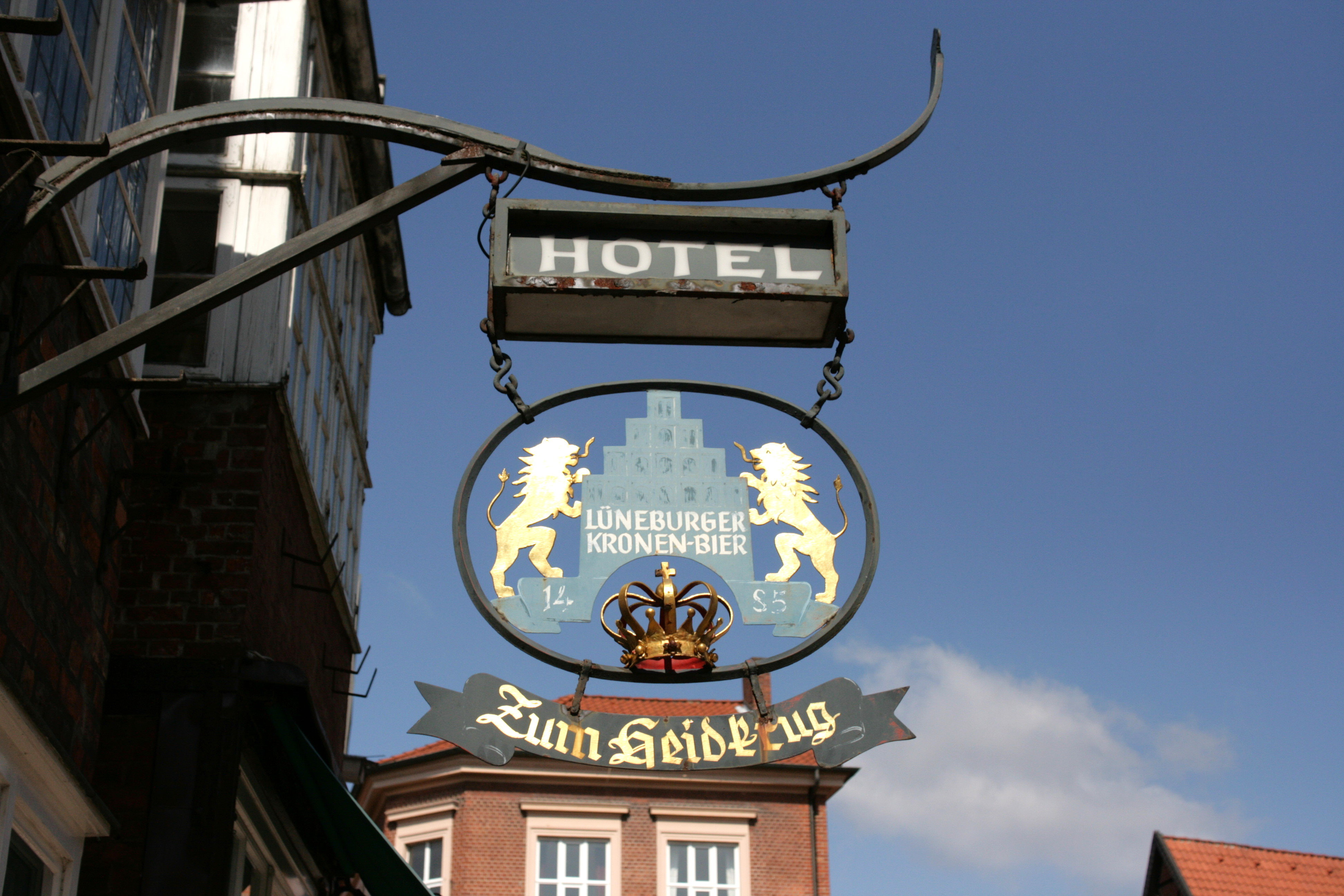 Zum Heidkrug, Am Berge 5 in Lüneburg